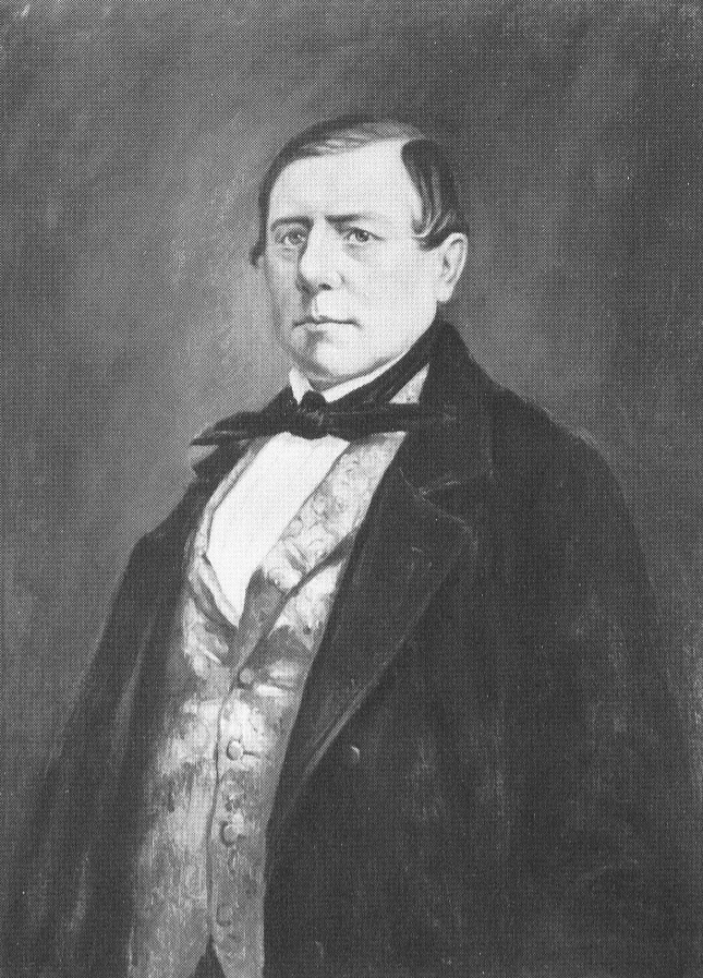 Christian Bacciocco (1799-1869), Bürgermeister von Mettmann und Mönchengladbach